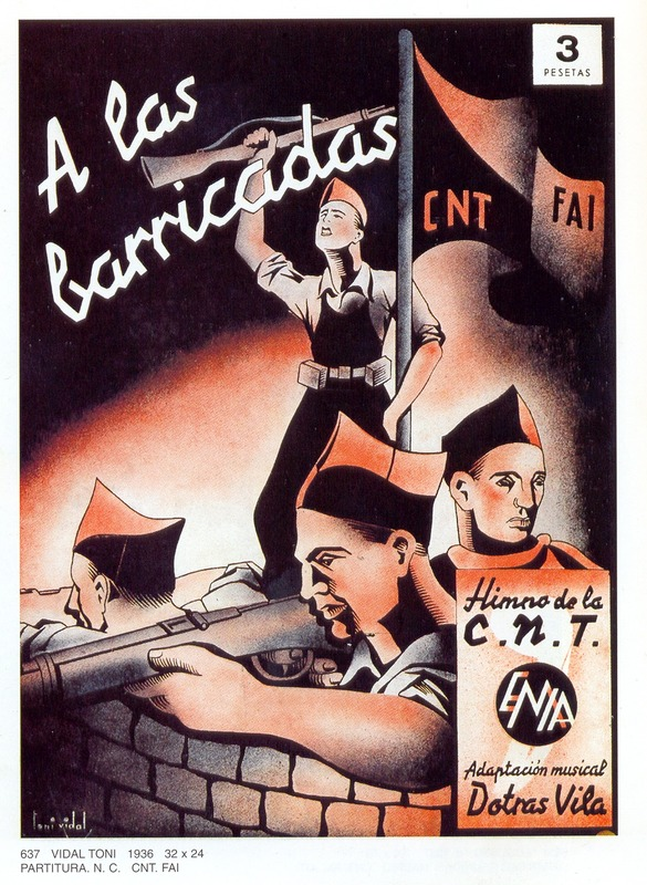 Milicianos en rojo y negro. Ilustración de la cubierta para el texto y la partitura del himno " A las Barricadas".Ediciones EMIA.